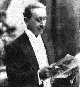 Fotografía del político y empresario español Rómulo Bosch publicada en 1911 dentro de un artículo sobre el Partido Liberal en Cataluña